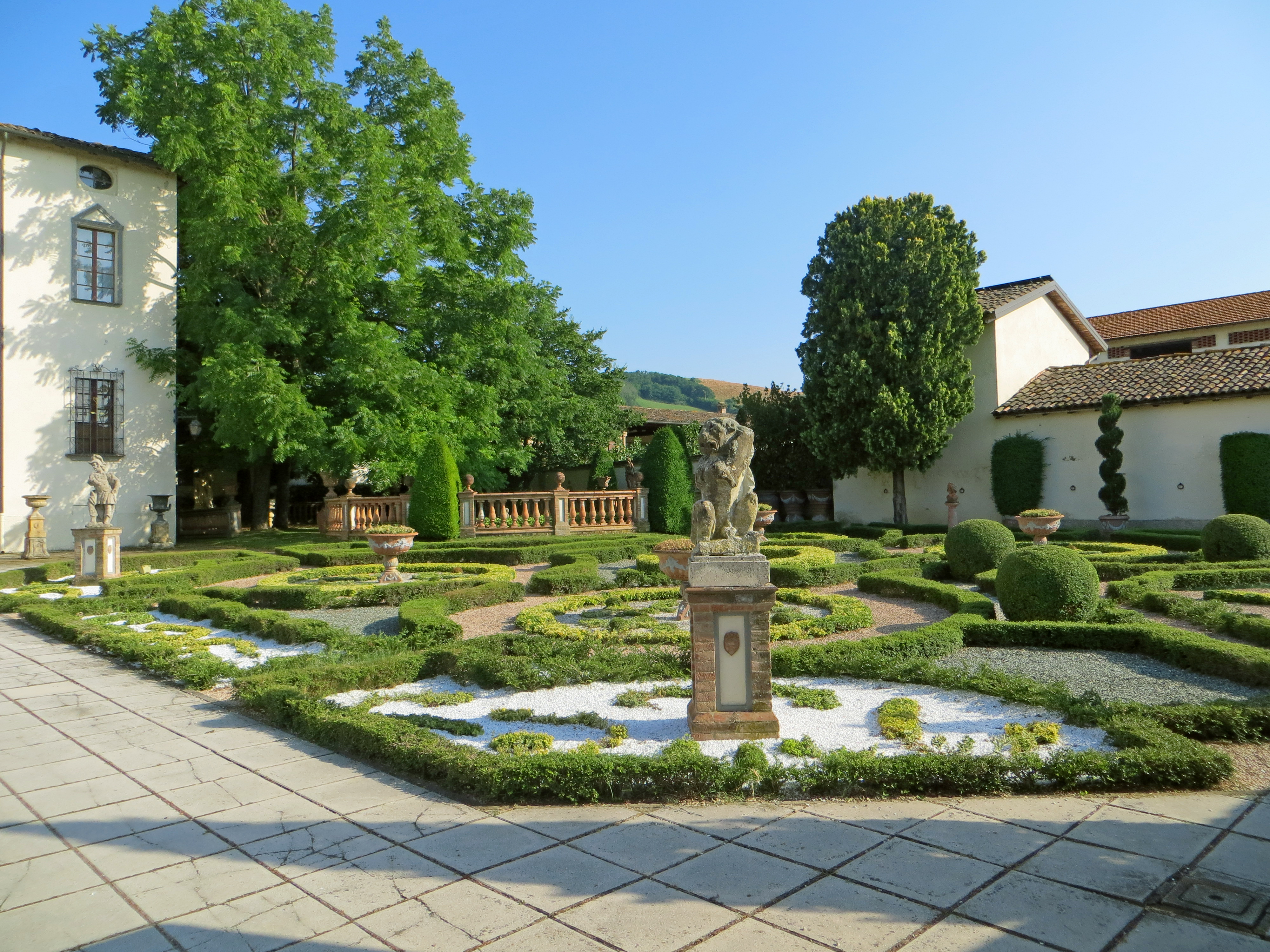 Villa Lanfranchi (Santa Maria del Piano, Lesignano de' Bagni) - lato sud del giardino